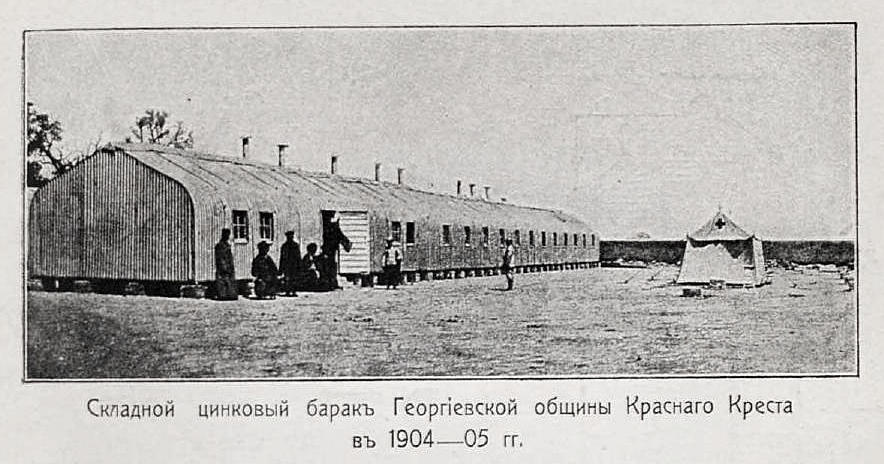 Данное изображение было использовано в статье «Бараки» опубликованной в четвёртом томе «Военной энциклопедии», который был издан книгоиздательским товариществом Ивана Дмитриевича Сытина в 1911 году в столице Российской империи городе Санкт-Петербурге.